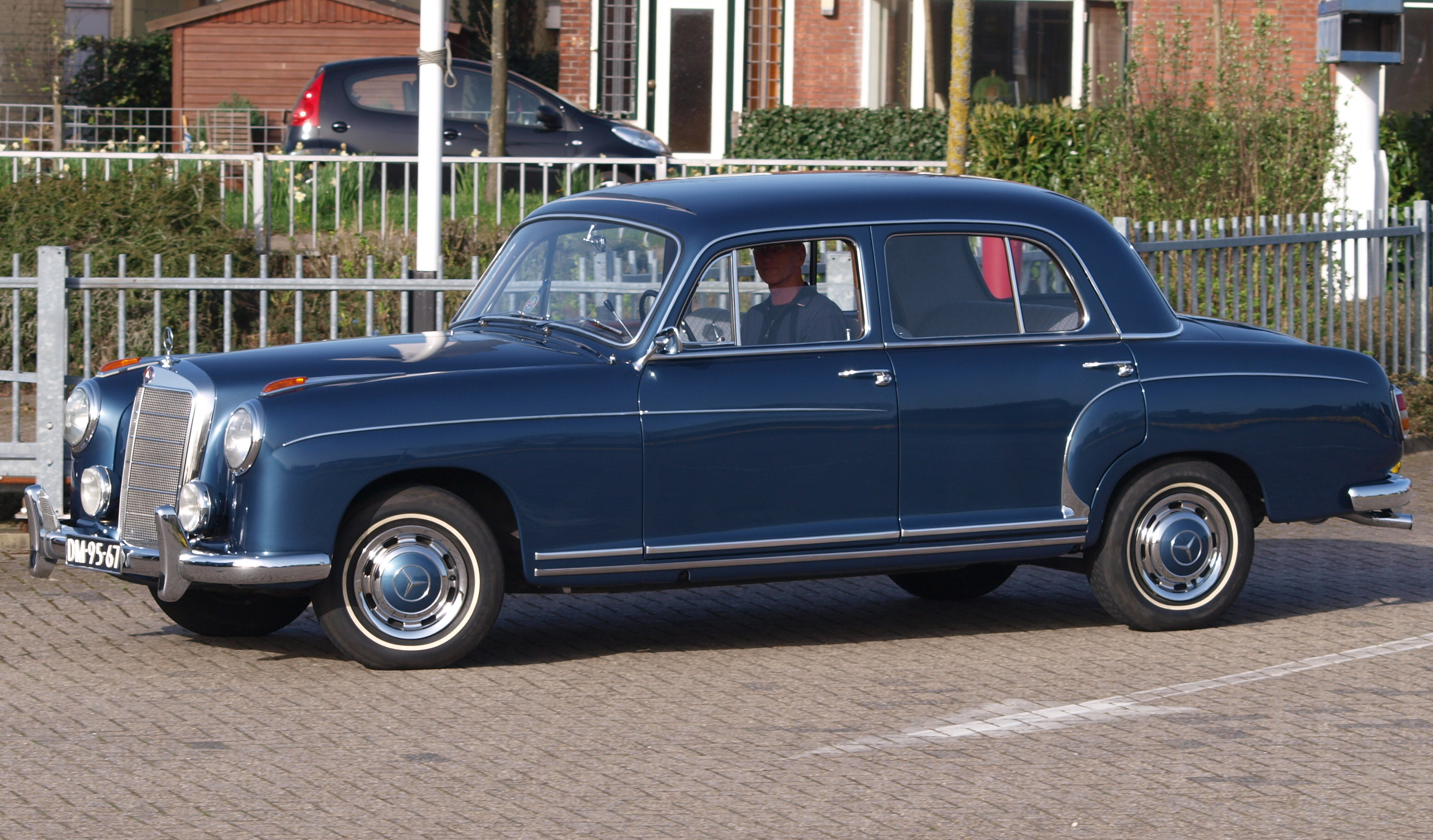 1959 Mercedes-Benz 220S